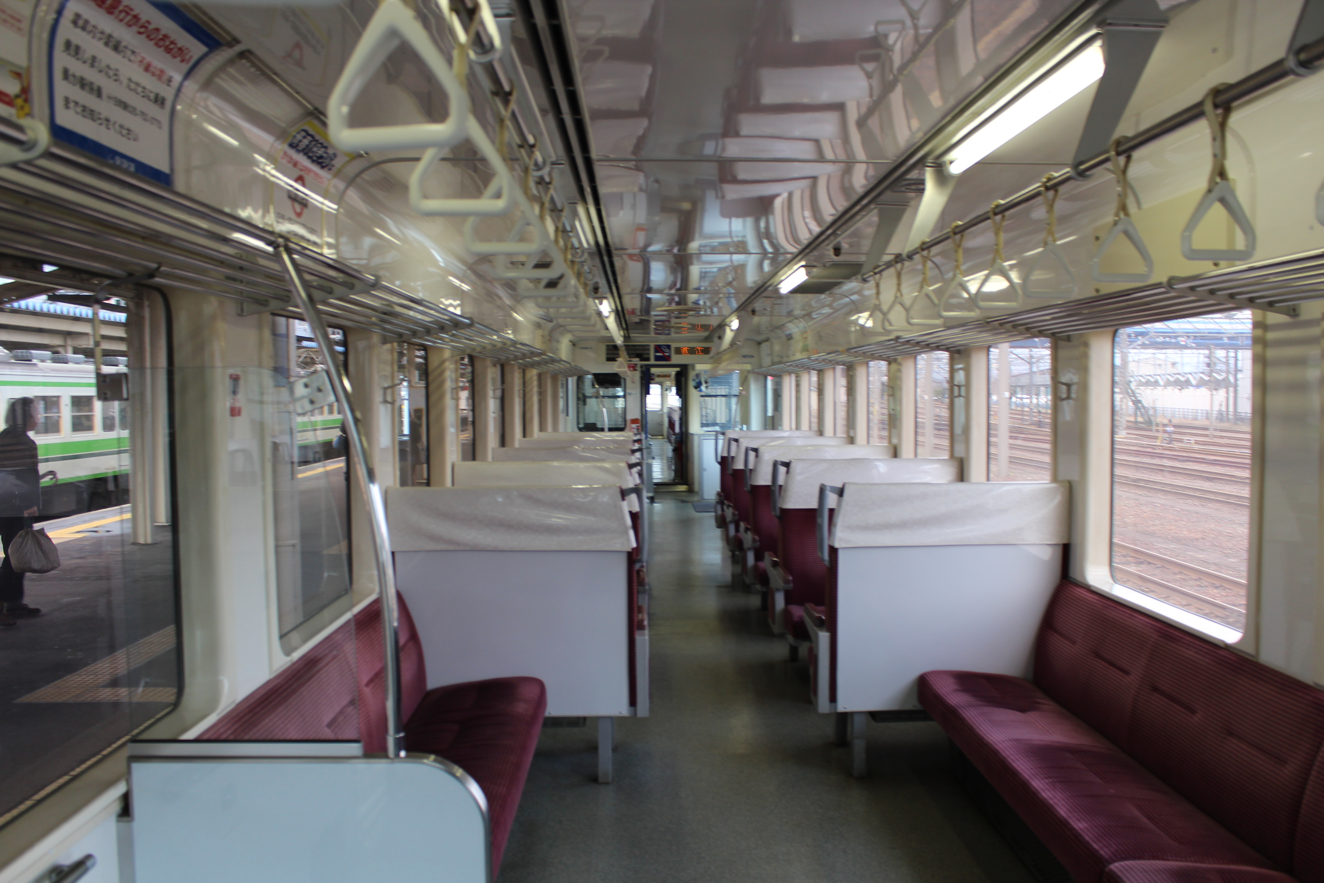 直江津駅に停車中のHK100型の車内